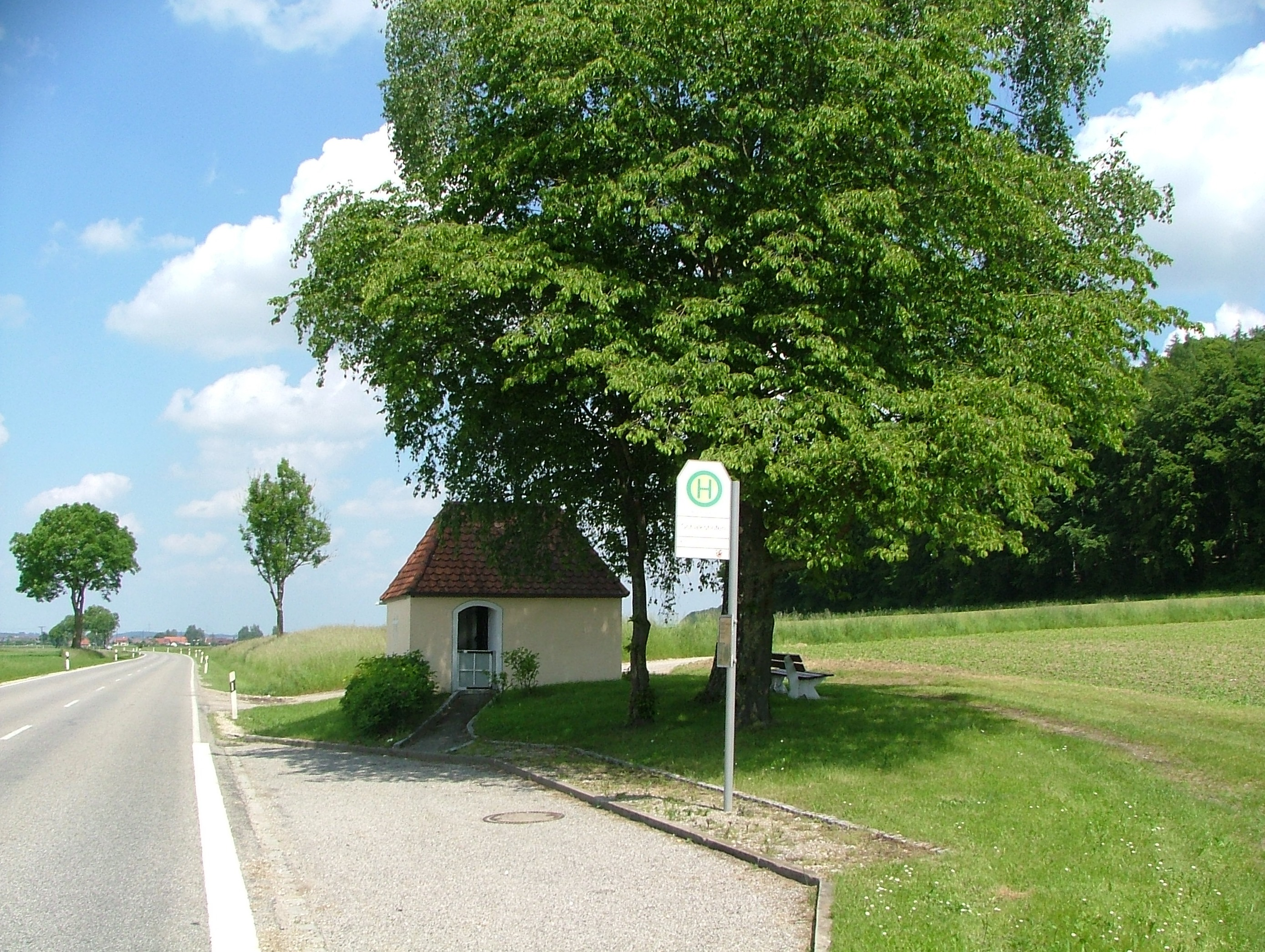 Oberroth Feldkapelle Schalkhofen